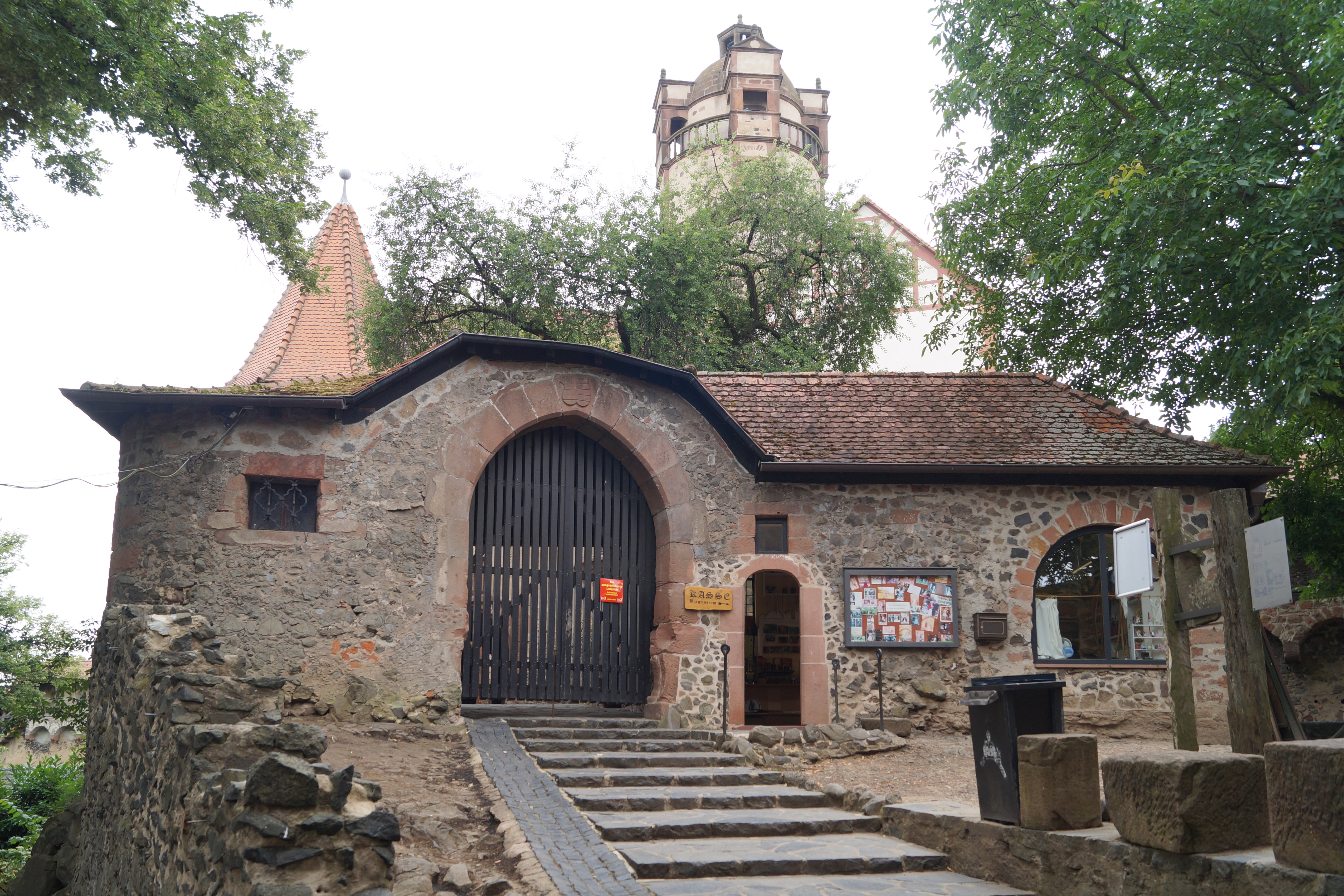 Burg Ronneburg, Hessen, Ansicht des zweiten Torhauses (heute Museumskasse) von Osten. Wappenstein des Grafen Philipp von Ysenburg-Büdingen und seiner Gemahlin Amalie von Rieneck mit der Jahreszahl 1527.